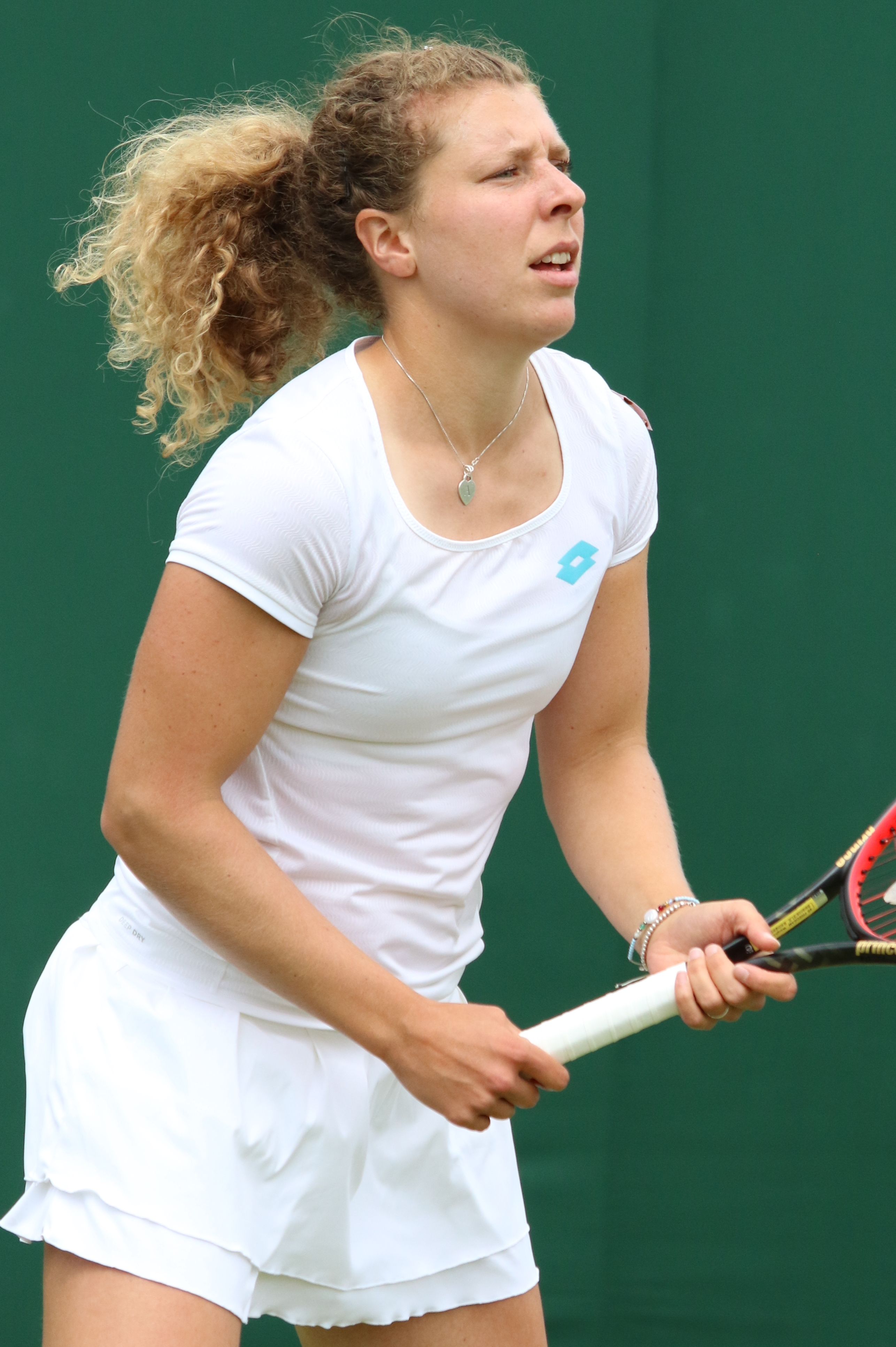 Friedsam WM19 (4)